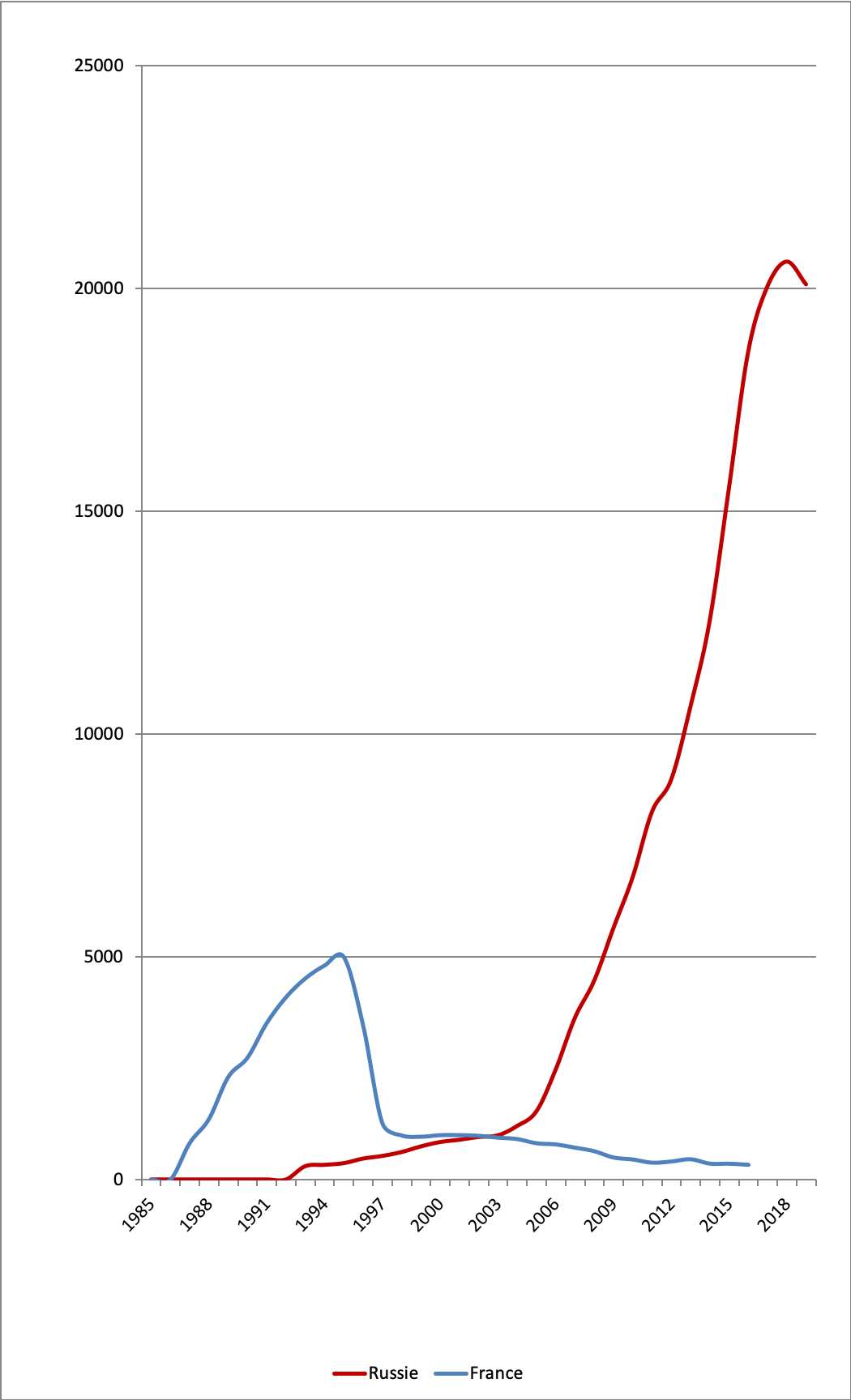 Evolution du nombre annuel des décès liés au sida en Russie et en France depuis 1985 Sources : INSERM pour la France. Centre fédéral de prévention et de lutte contre le sida pour la Fédération de Russie jusqu'en 2004, Rosstat ensuite